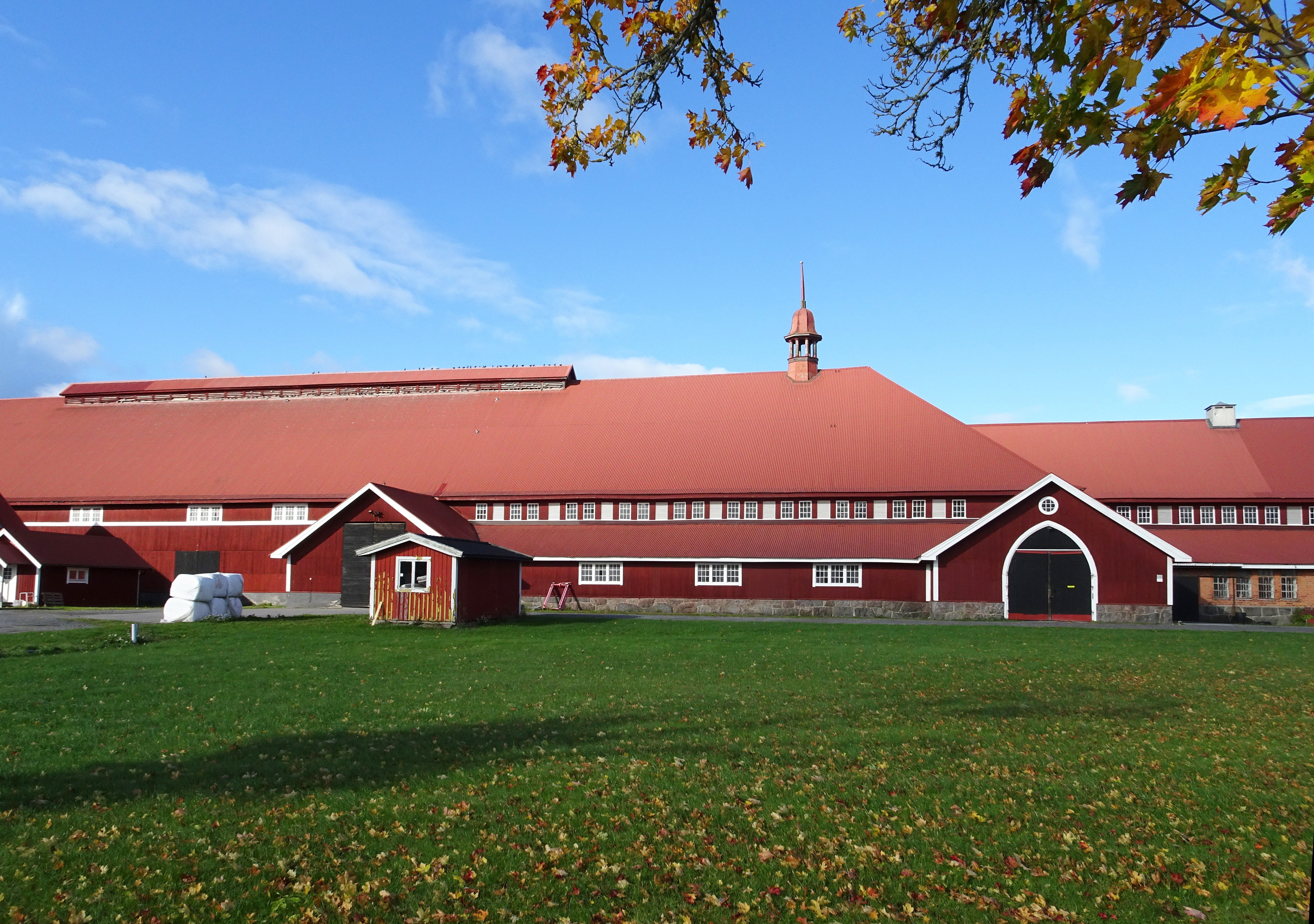 Årsta säteri (gamla Årsta ladugård från 1910-talet)